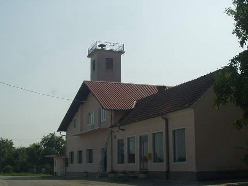 Zvekovac - Dom